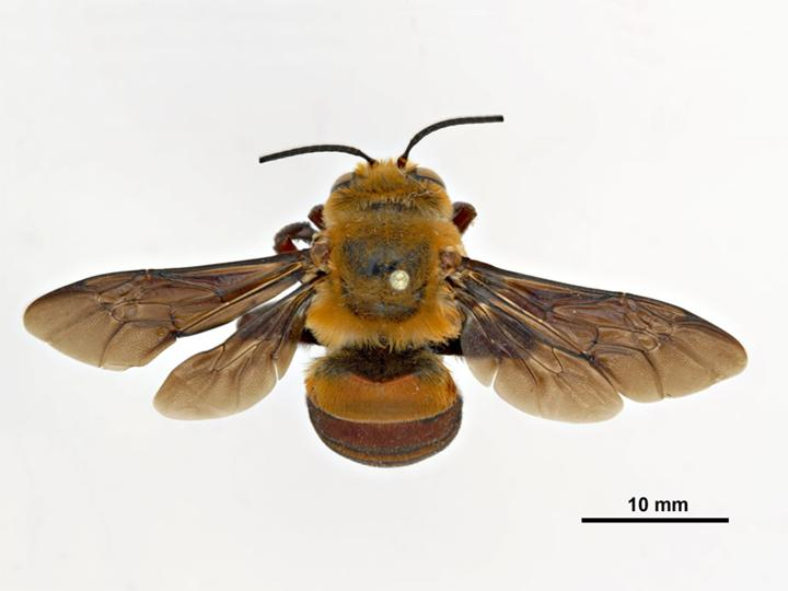 Amegilla dawsoni female